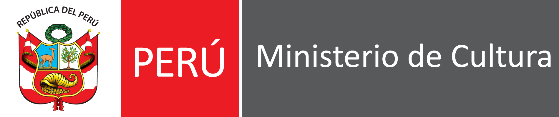 Colección Ministerios de la República del Perú